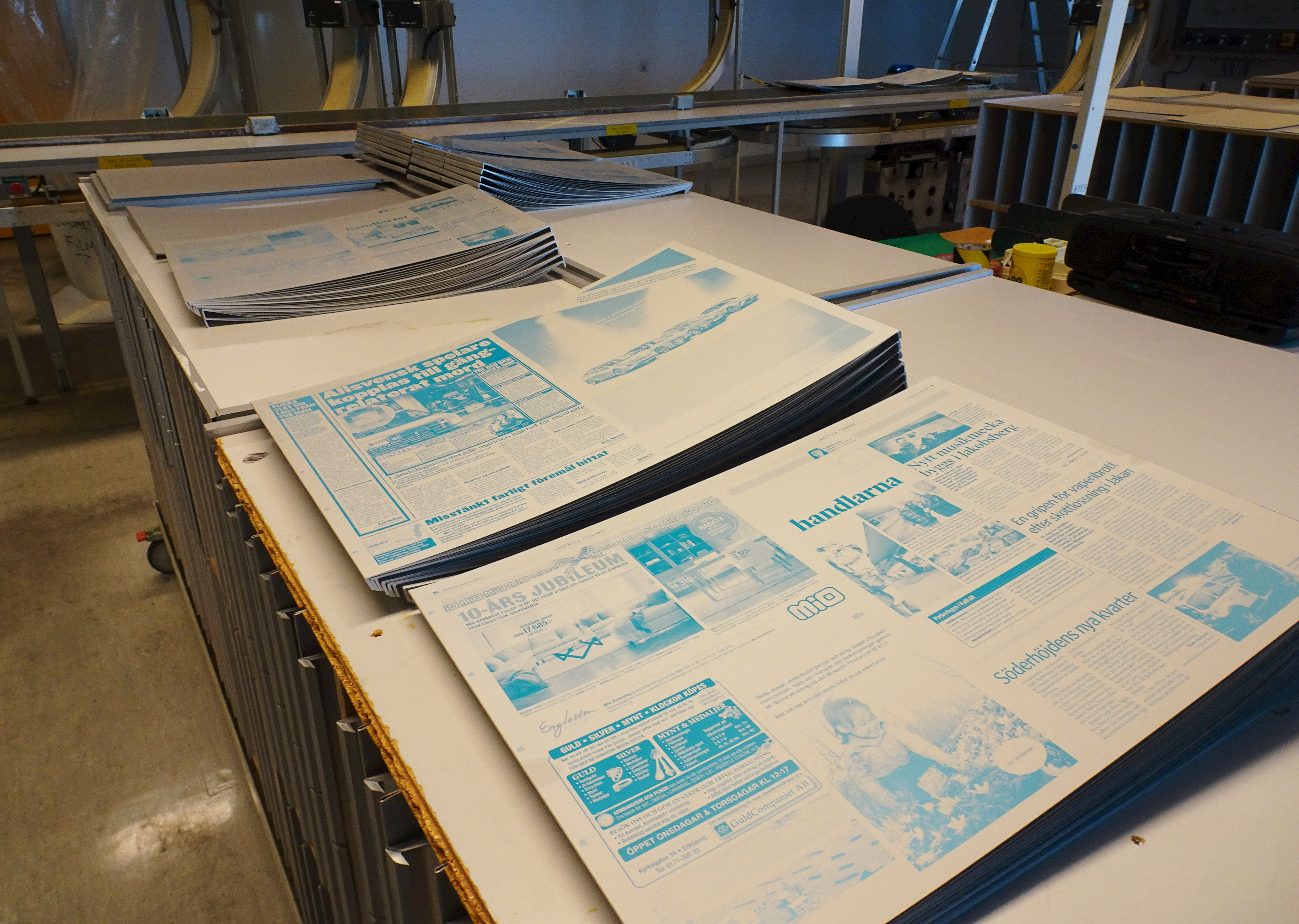 DNEX-Tryckeriet, tryckplåtar